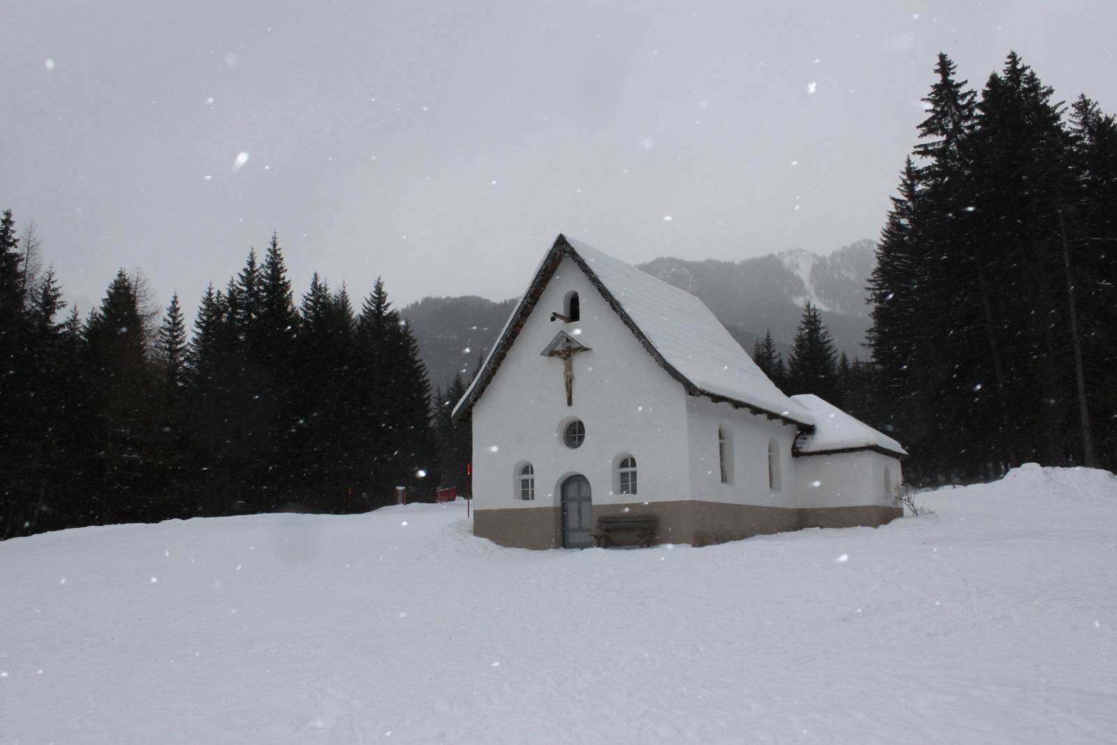 Malga Crocefisso